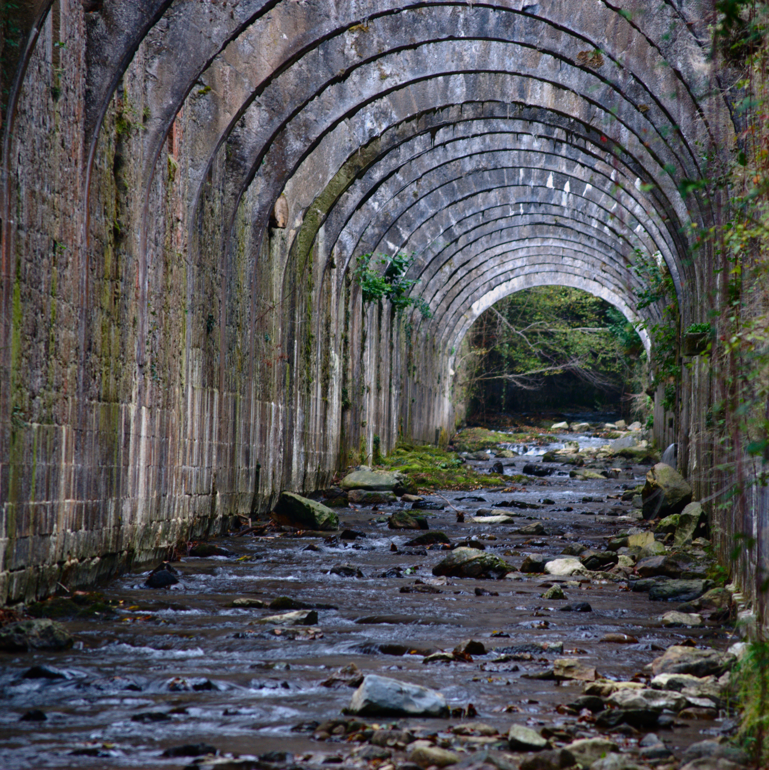 Itolaz erreka Orbaitzetako ola gurutzatzen